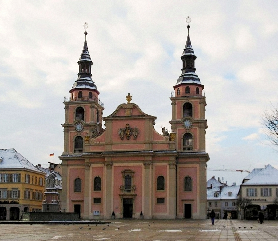 Evangelische Stadtkirche Ludwigsburg